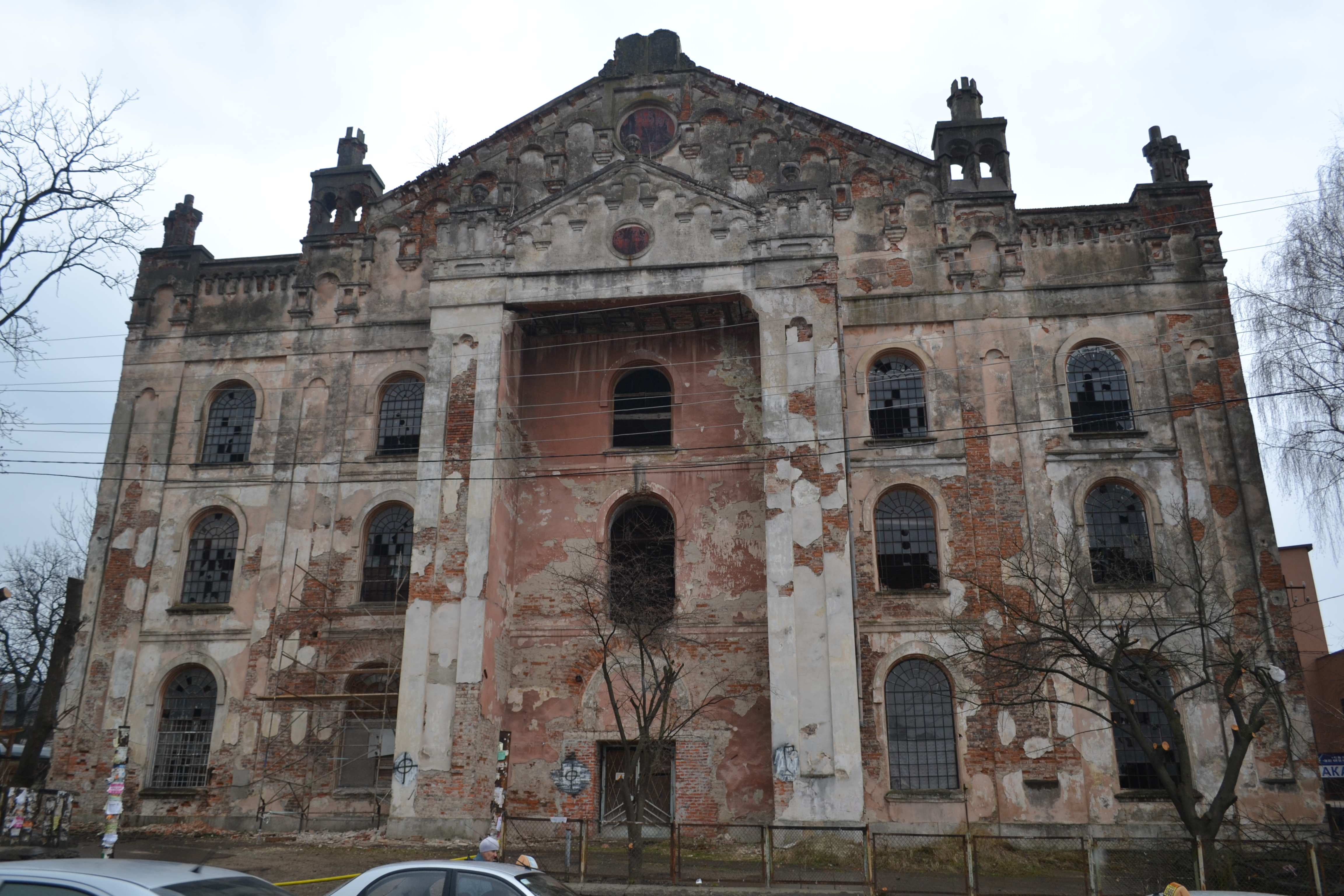 Хоральна синагога (Дрогобич), Дрогобич, вул. П. Орлика, 6